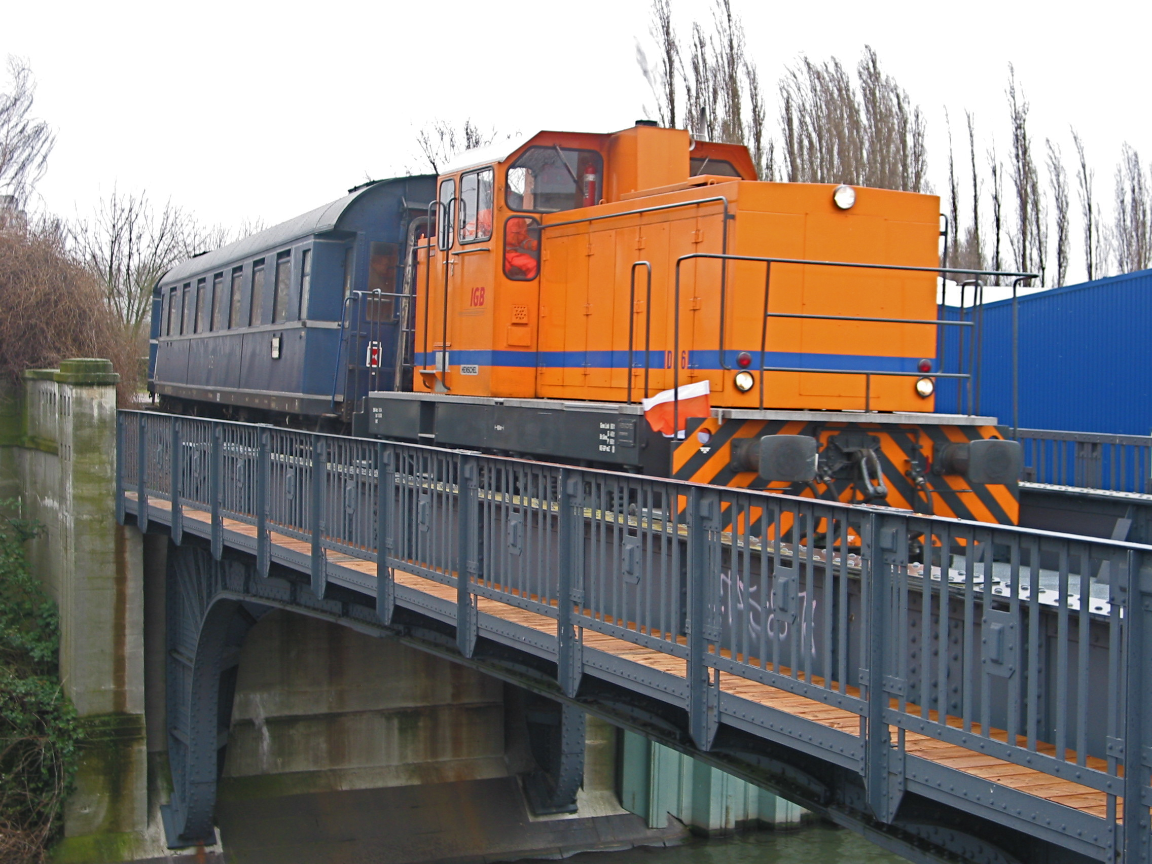 Berlin-Neukoelln: DL 06 der Industriebahn-Gesellschaft Berlin überquert mit einem Sonderzug des Vereins Traditionszug Berlin e.V. den Neuköllner Schifffahrtskanal